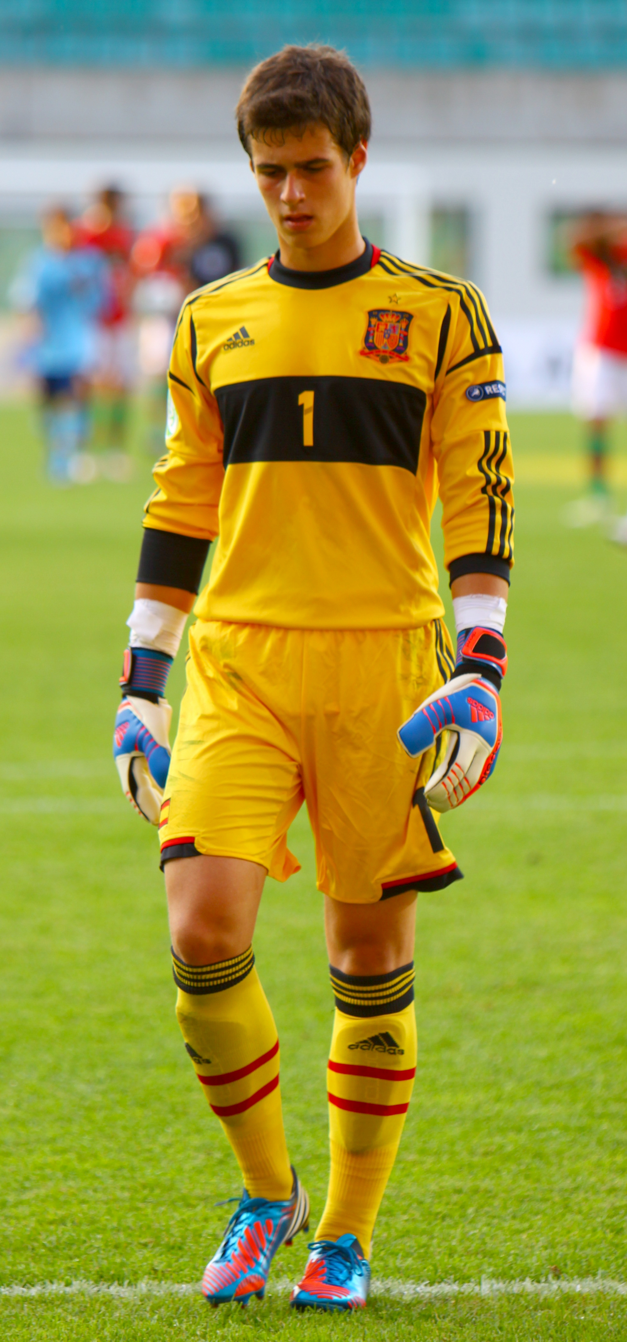 U-19 Portugal vs Spain.